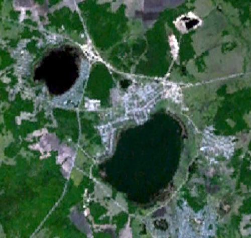 Kremenkul and lakes Maly Kremenkul and Bolshoi Kremenkul near Chelyabinsk, Russia